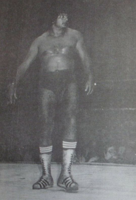 Chavo Guerrero dans un programme de catch du 7 octobre 1977.